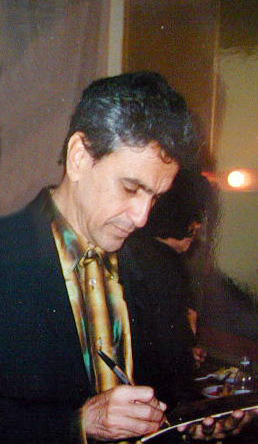 Caetano Veloso in Milan, Smeraldo Theatre, 1996